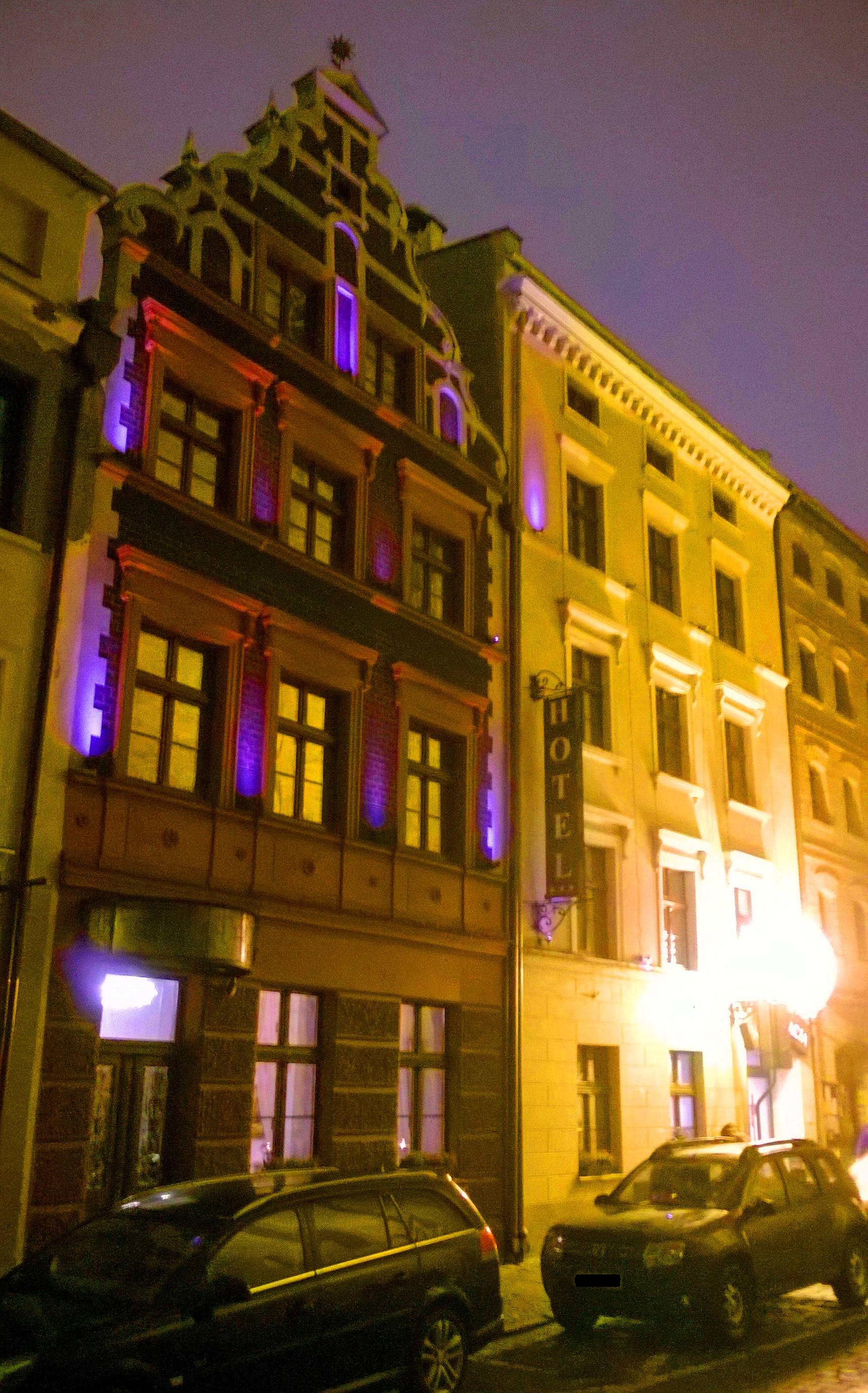 Hotel Solaris w Toruniu